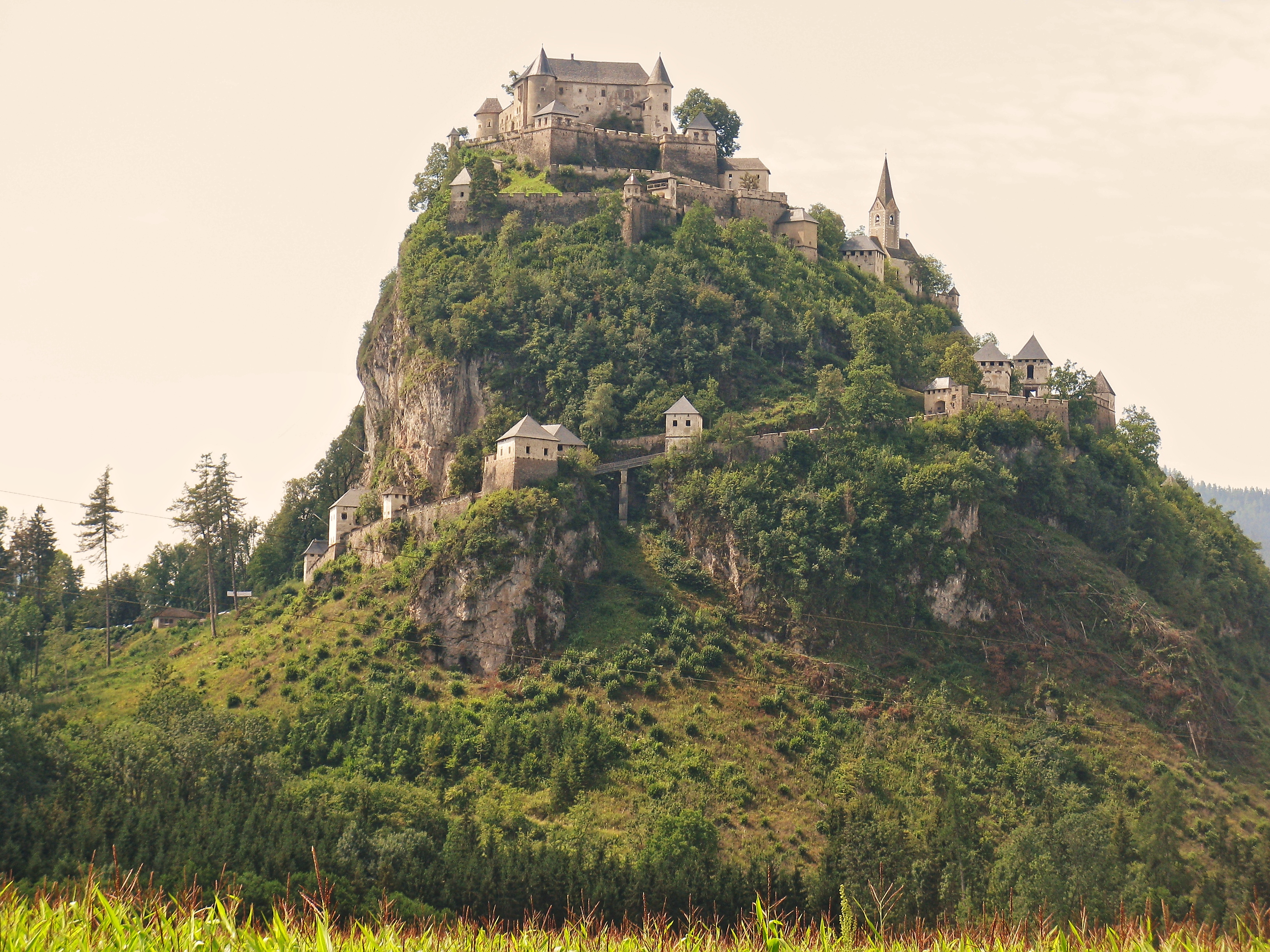 Burg Hochosterwitz